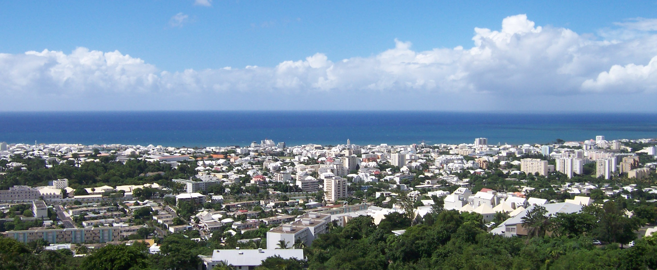 Saint-Denis de la Réunion general view taken from Bellepierre Photo : B.navez - 23 MAR 2006 - Réunion island